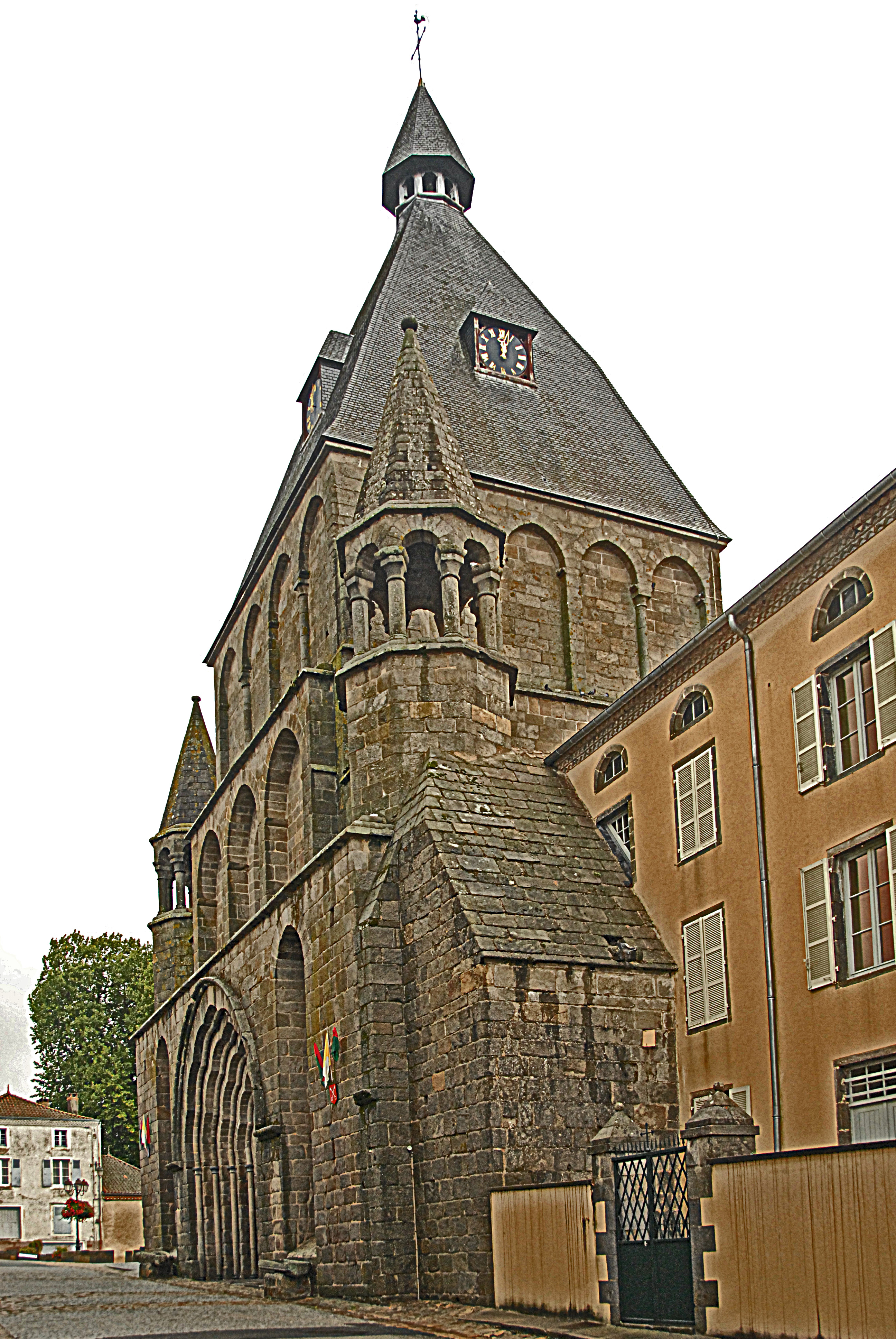 St-Pierre de Le Dorat, Westwerk von SW